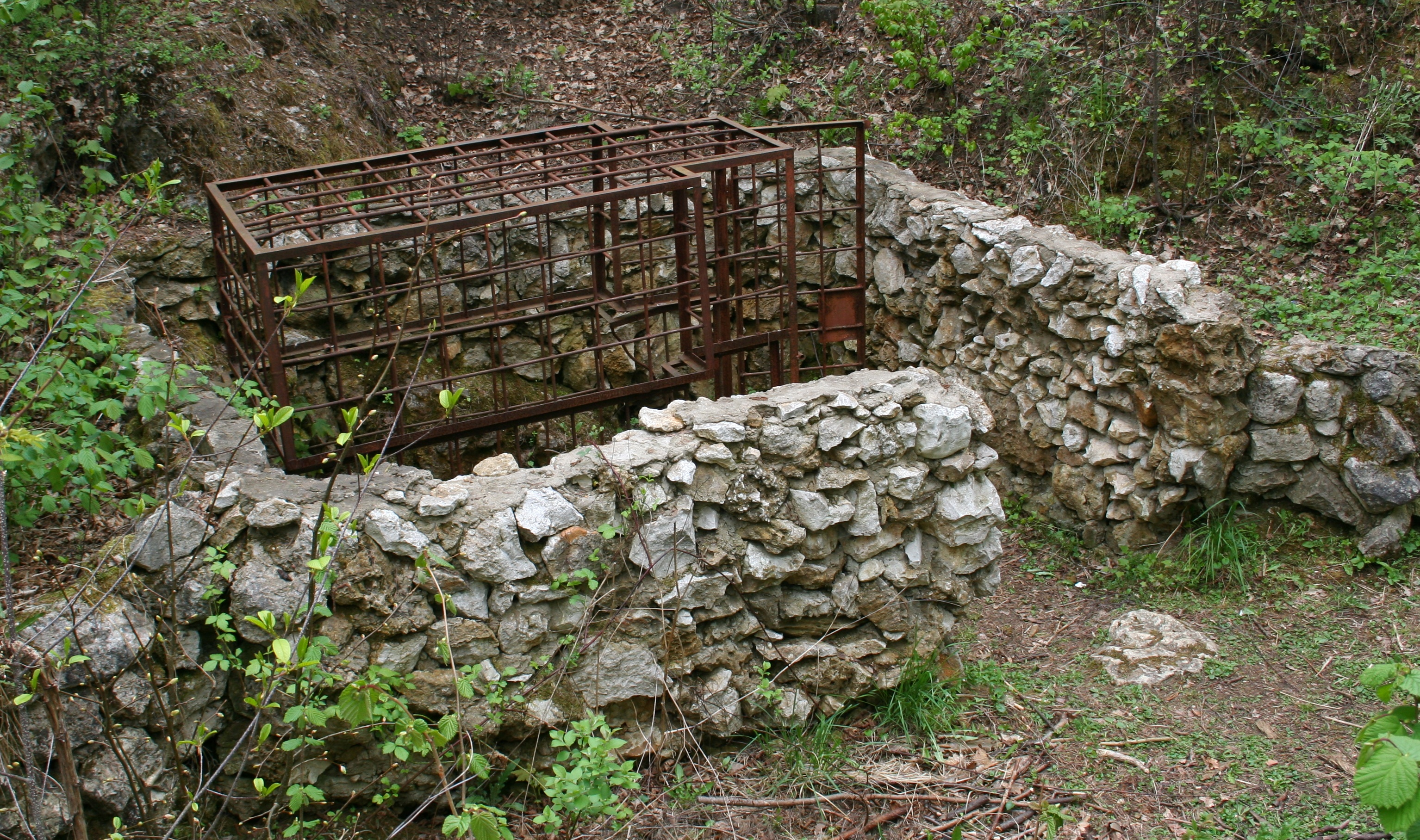 Wejście do Jaskini Ewy w miejscowości Draby, woj. łódzkie